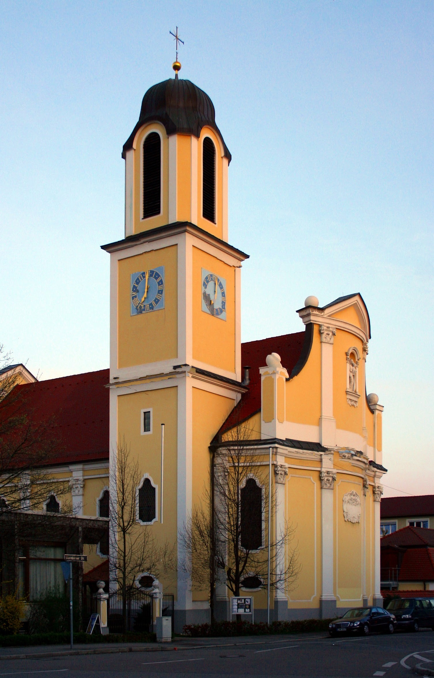 Kirche St. Maria Himmelfahrt des Priorats der Piusbruderschaft St. Athanasius in Stuttgart-Feuerbach